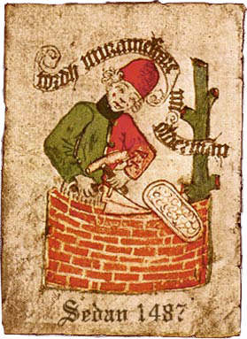 Murmestare Embetets skråordning finns i original bevarad på Kungliga Biblioteket. På dess försättsblad finns det äldsta porträttet av en Stockholmsborgare, Tordh Muramestare, vilket sannolikt tecknats av Helmick van Nörden som präntade stadgan och fungerade som rådets sekreterare.